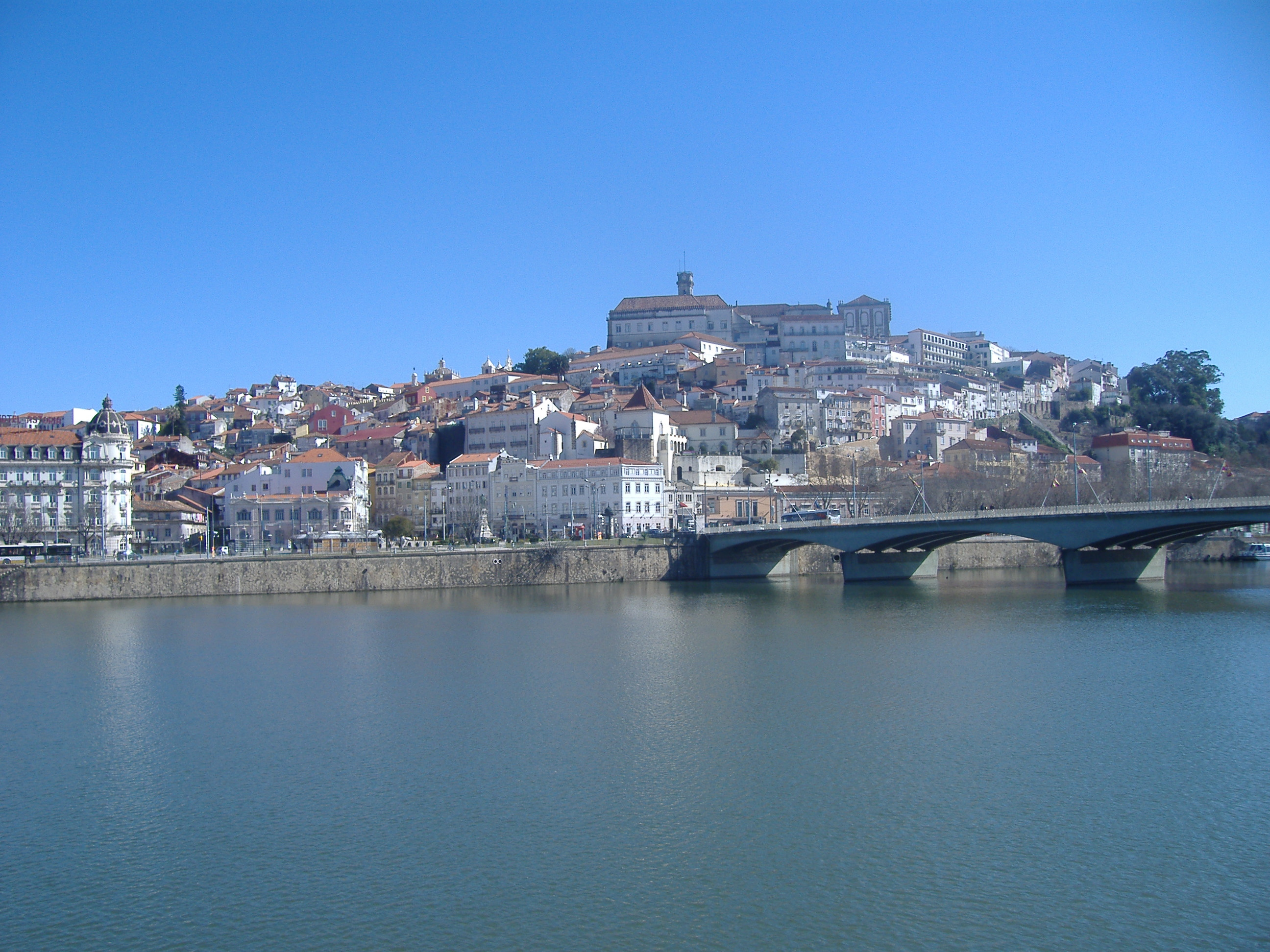 Estremeñu: Afotu dela ciá e Coimbra dendi l'otru lau 'el tozu Mondego